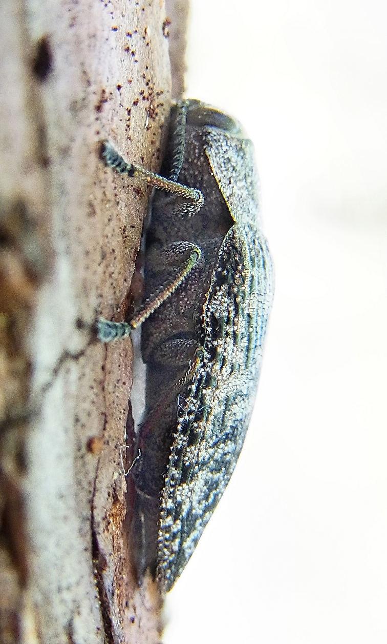 Poecilonota variolosa aus Spanien, Katalonien, La Llacuna, Camping Vilademager am 15. Juni 2013